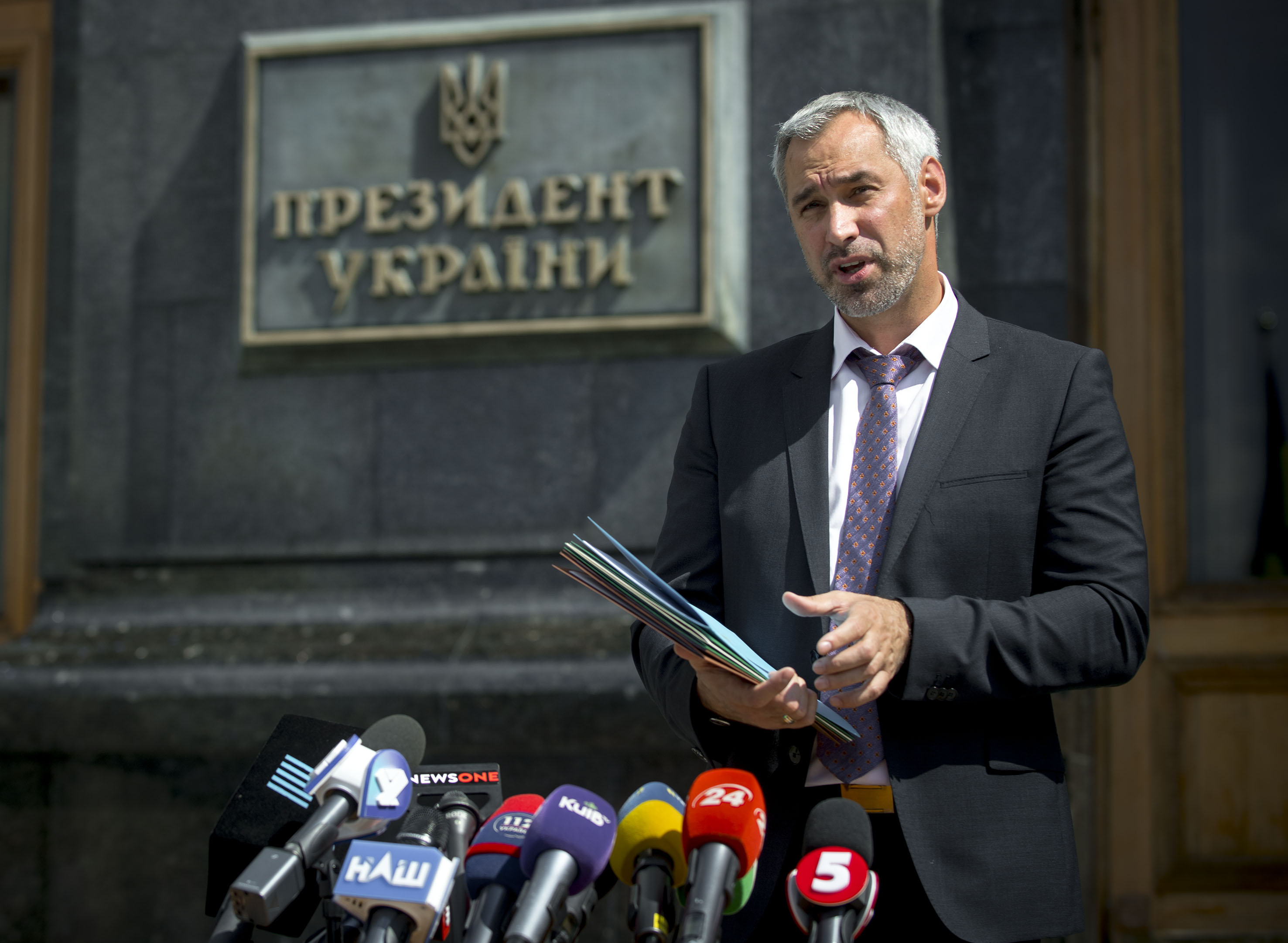 Рябошапка Руслан